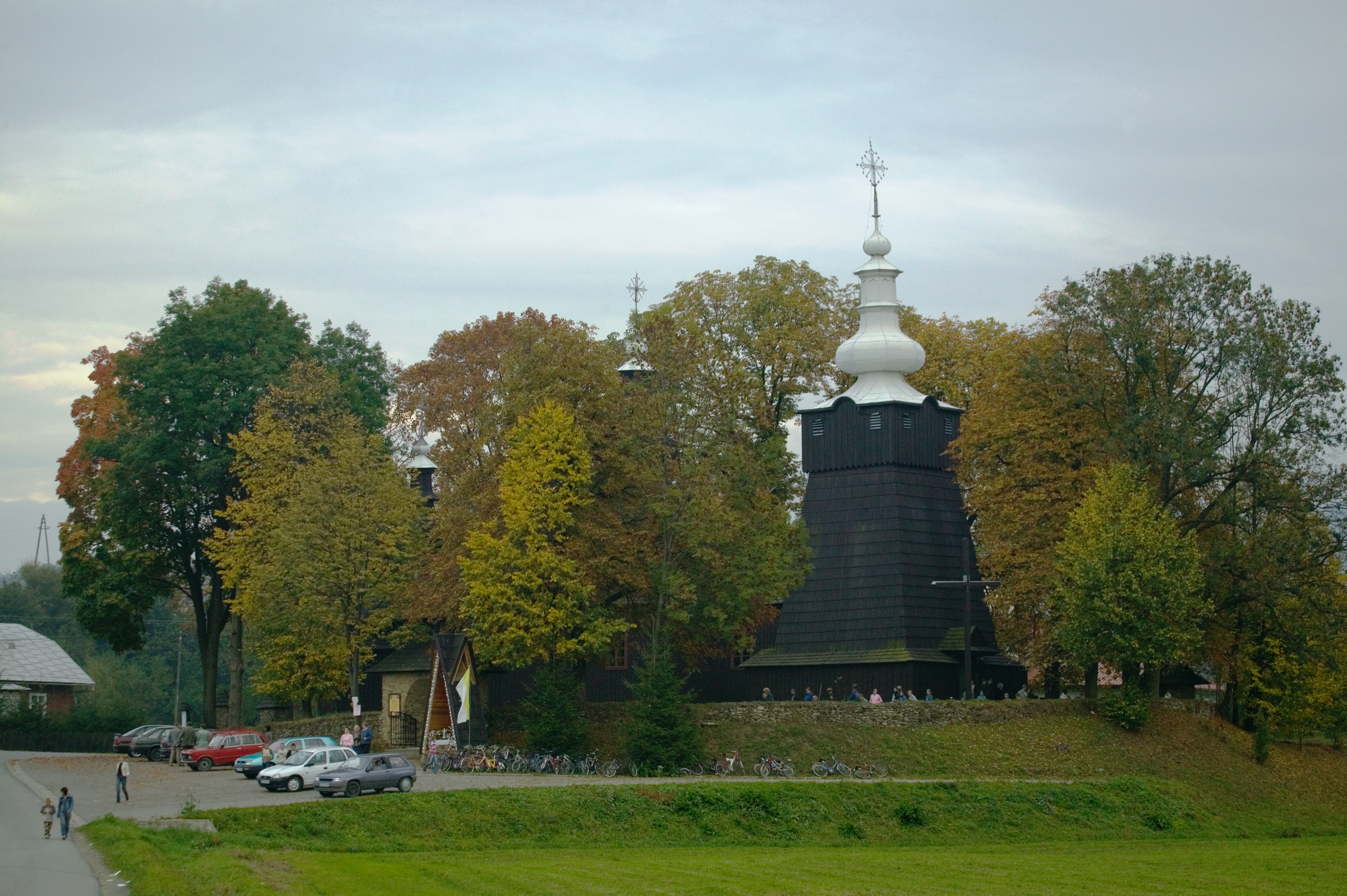 Brunary Wyżne, dawna greckokatolicka cerkiew p.w. św. Michała Archanioła